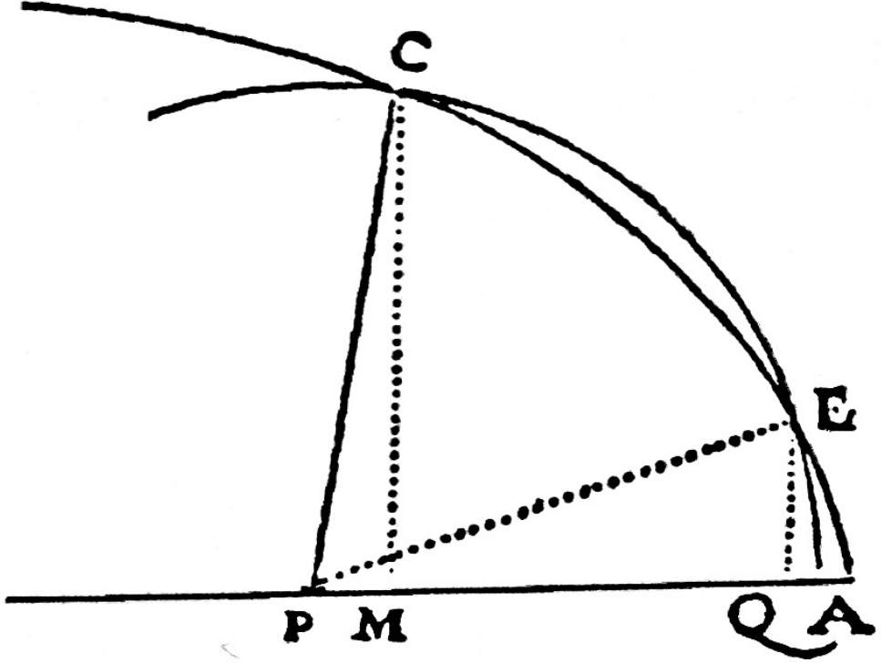 Càlcul de corbes tangents a la Geometria de Descartes